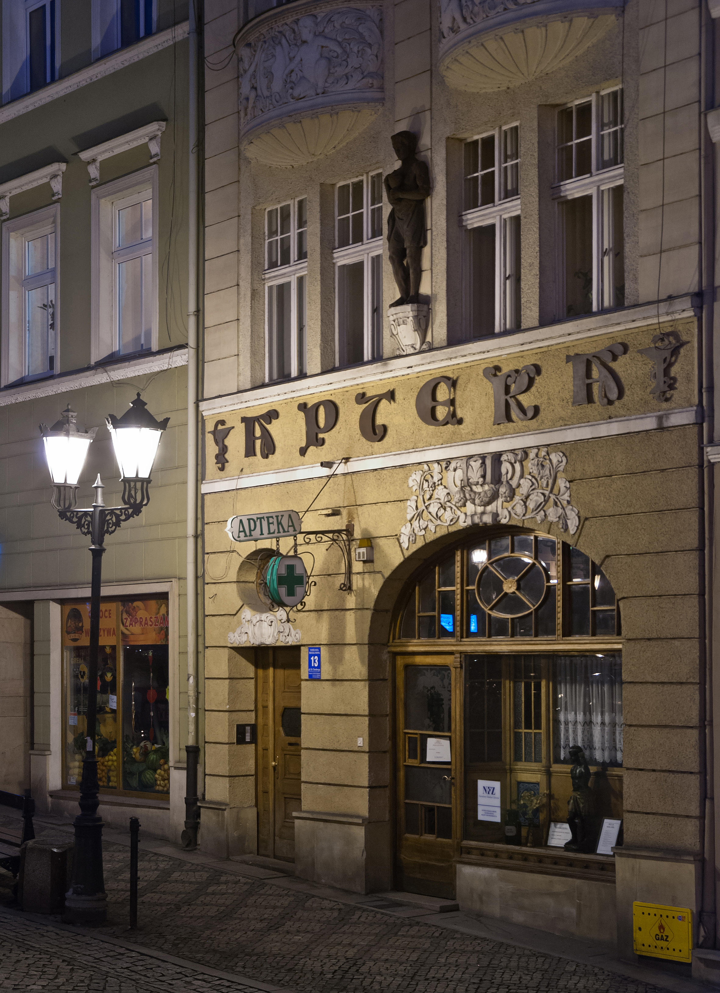 Kłodzko, dom, XVIII, 1900